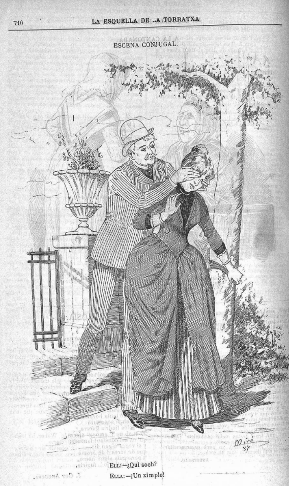 Página de la revista La Esquella de la Torratxa